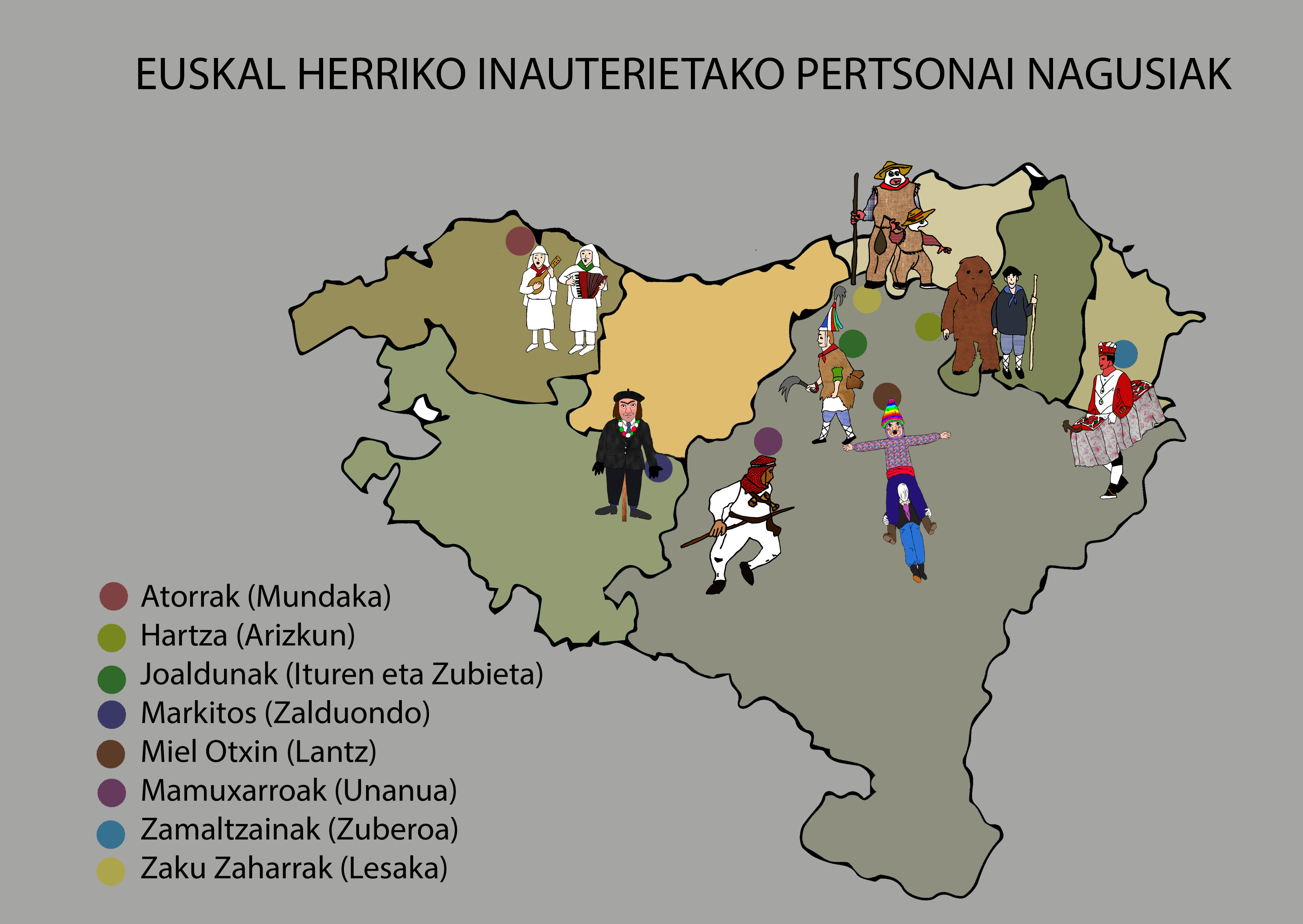 Inauterietako pertsonai nagusien kokapena Euskal Herriko mapan irudikatuta